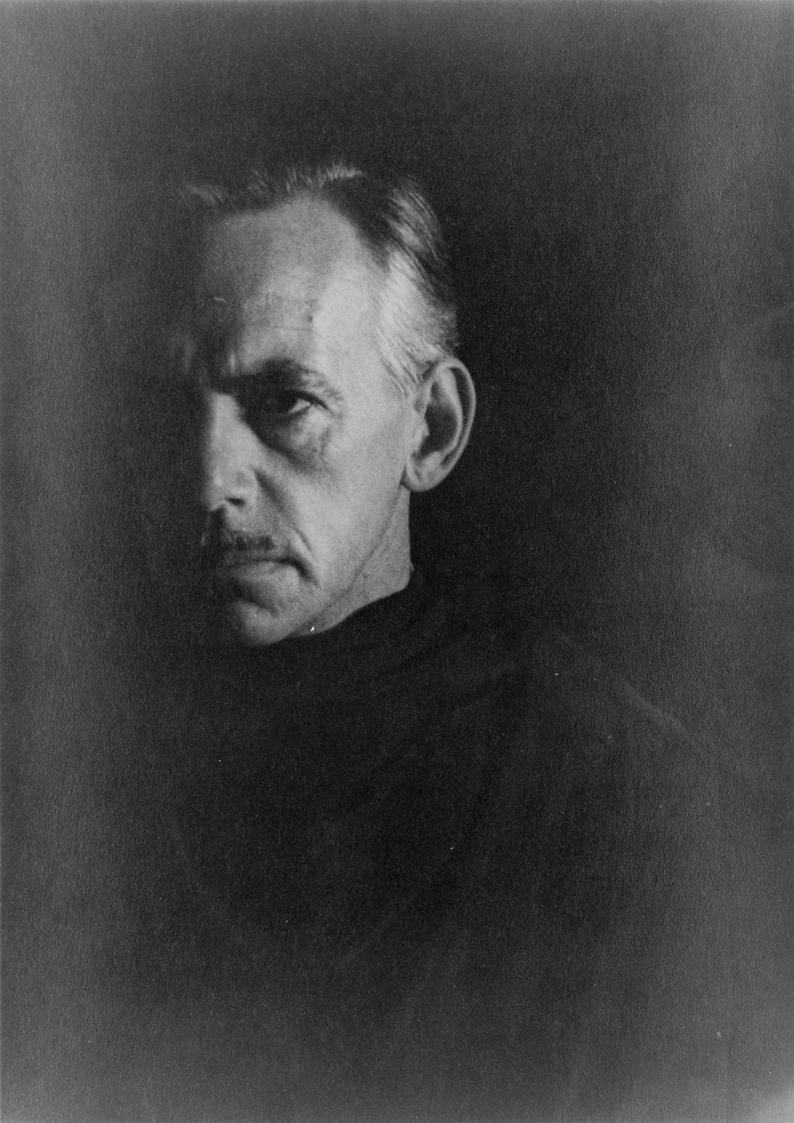 Eugene O'NeillPortrait of Eugene O'Neill